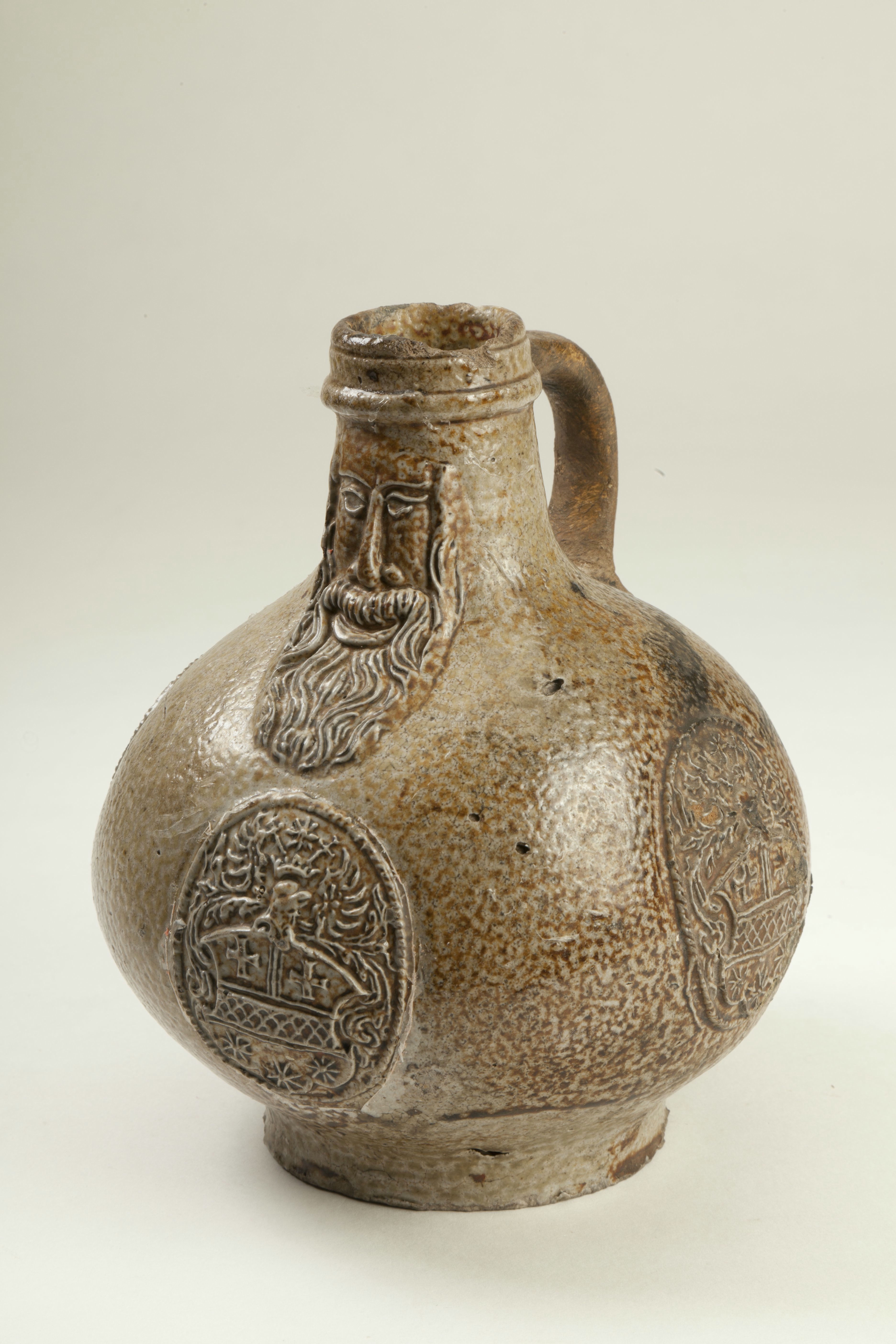 kleine, geel-grijze baardmankruik met goed geprofileerde baardman en 3 appliques met wapen Objectnummer: [MA]Z1951-V52 Materiaal: Steengoed